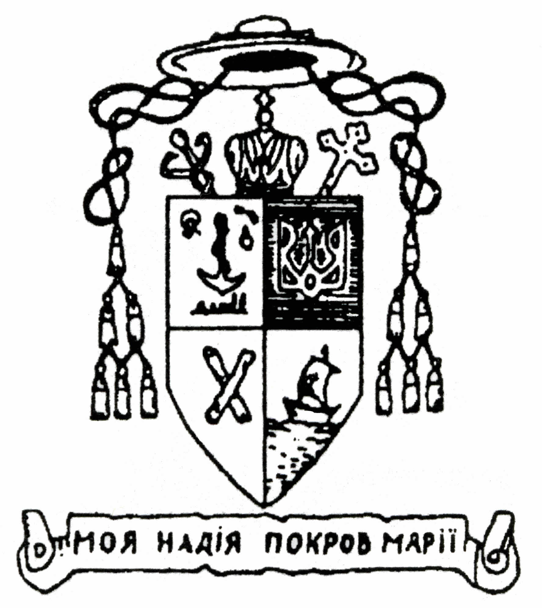 Герб Владики Андрія (Сапеляка)СДБ